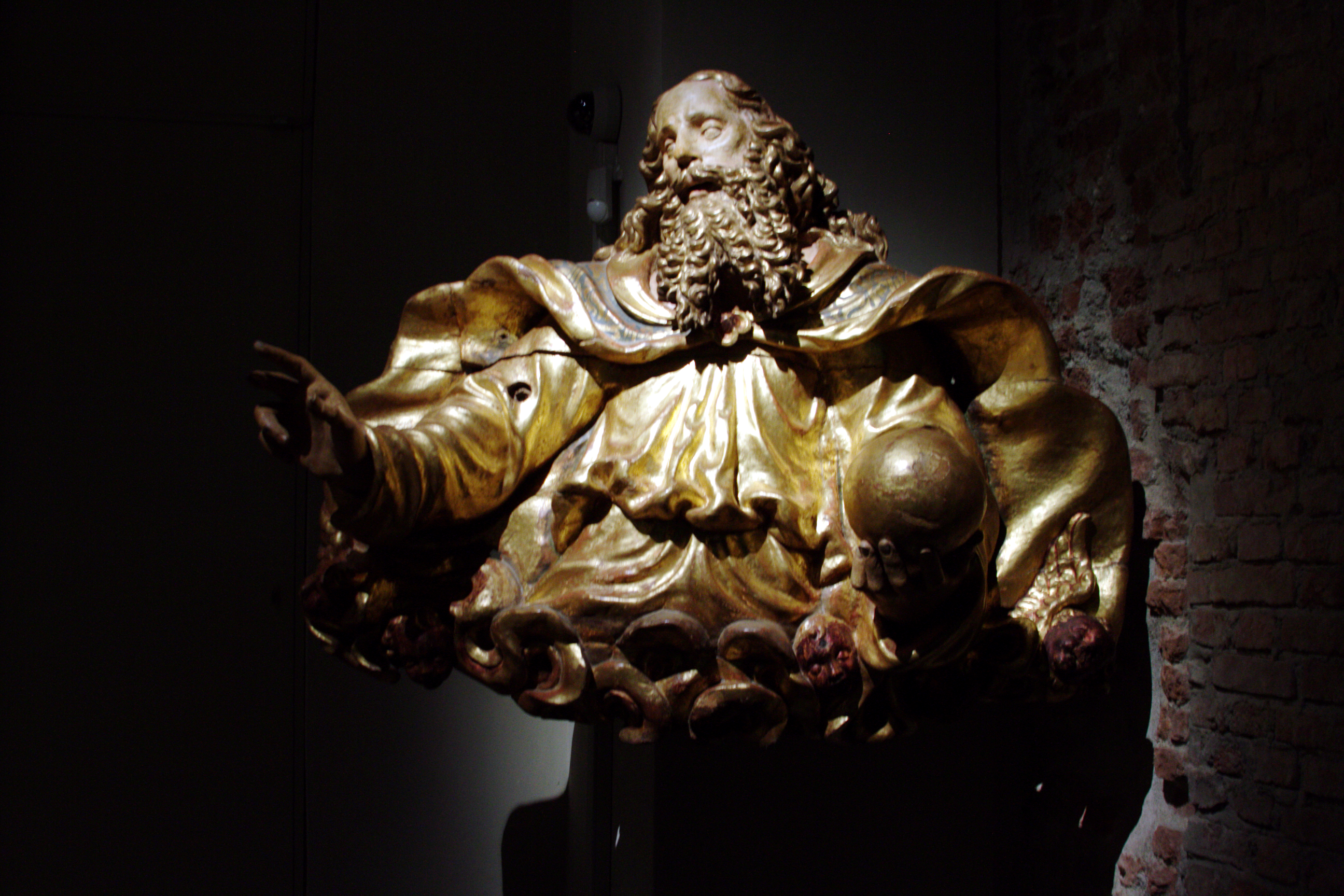 Museu do Duomo - Palazzo Reale - Milão